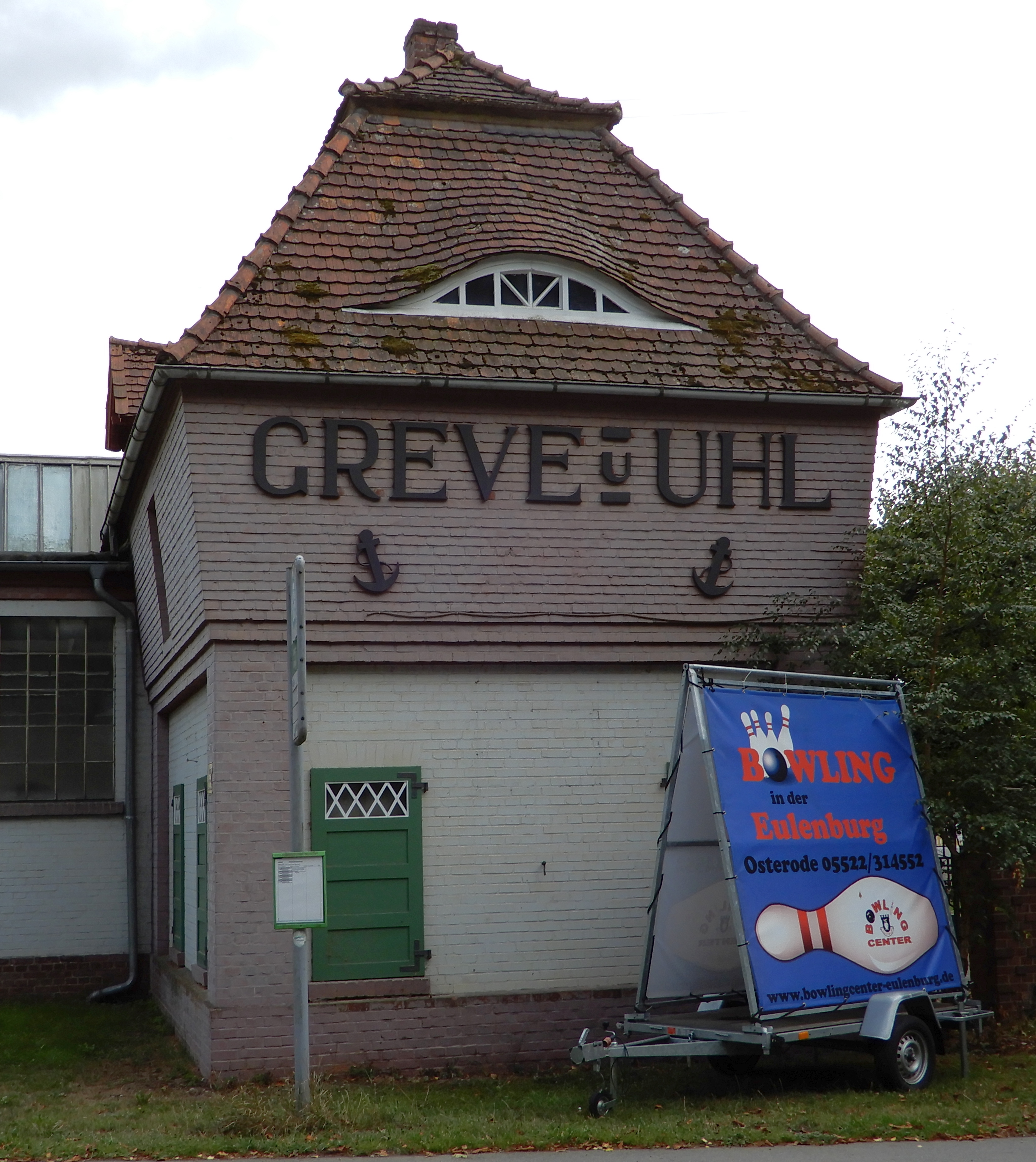 Die Eulenburg ist ein Industriedenkmal und Baudenkmal in Osterode am Harz.